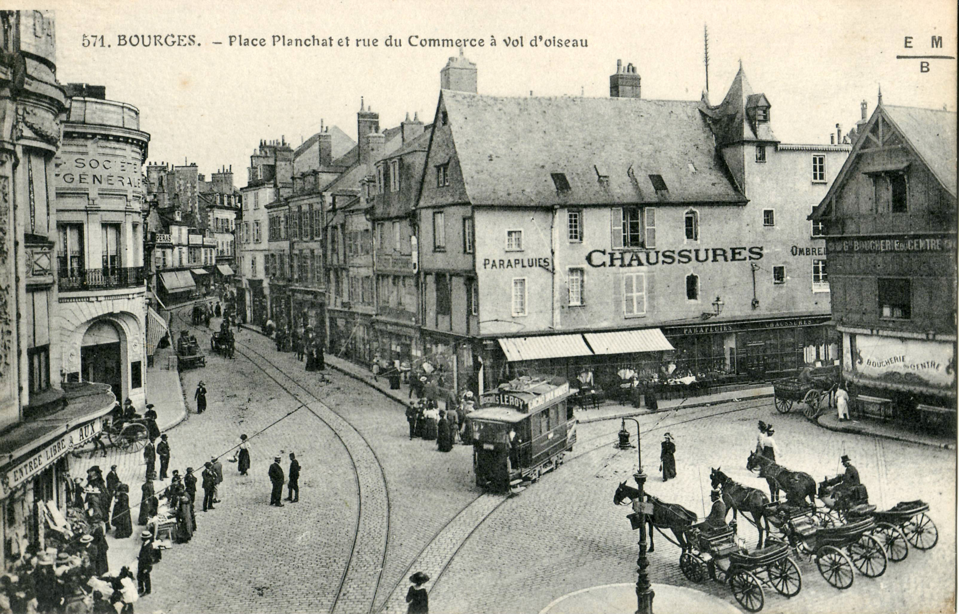 Carte postale ancienne éditée par EM - B n°571 : BOURGES - Place Planchat et rue du Commerce à vol d'oiseau